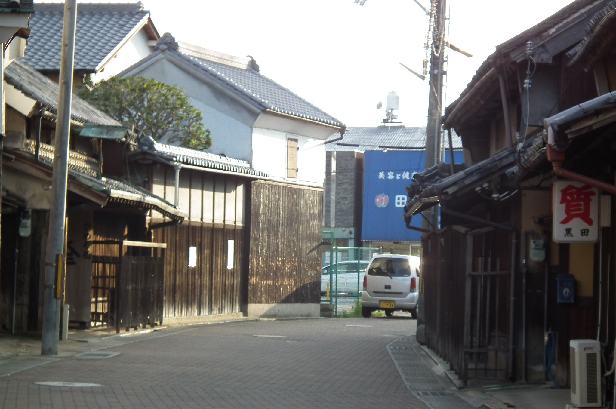 三木市本町二丁目 黒田質店 ひめじ道 Honmachi2-Miki